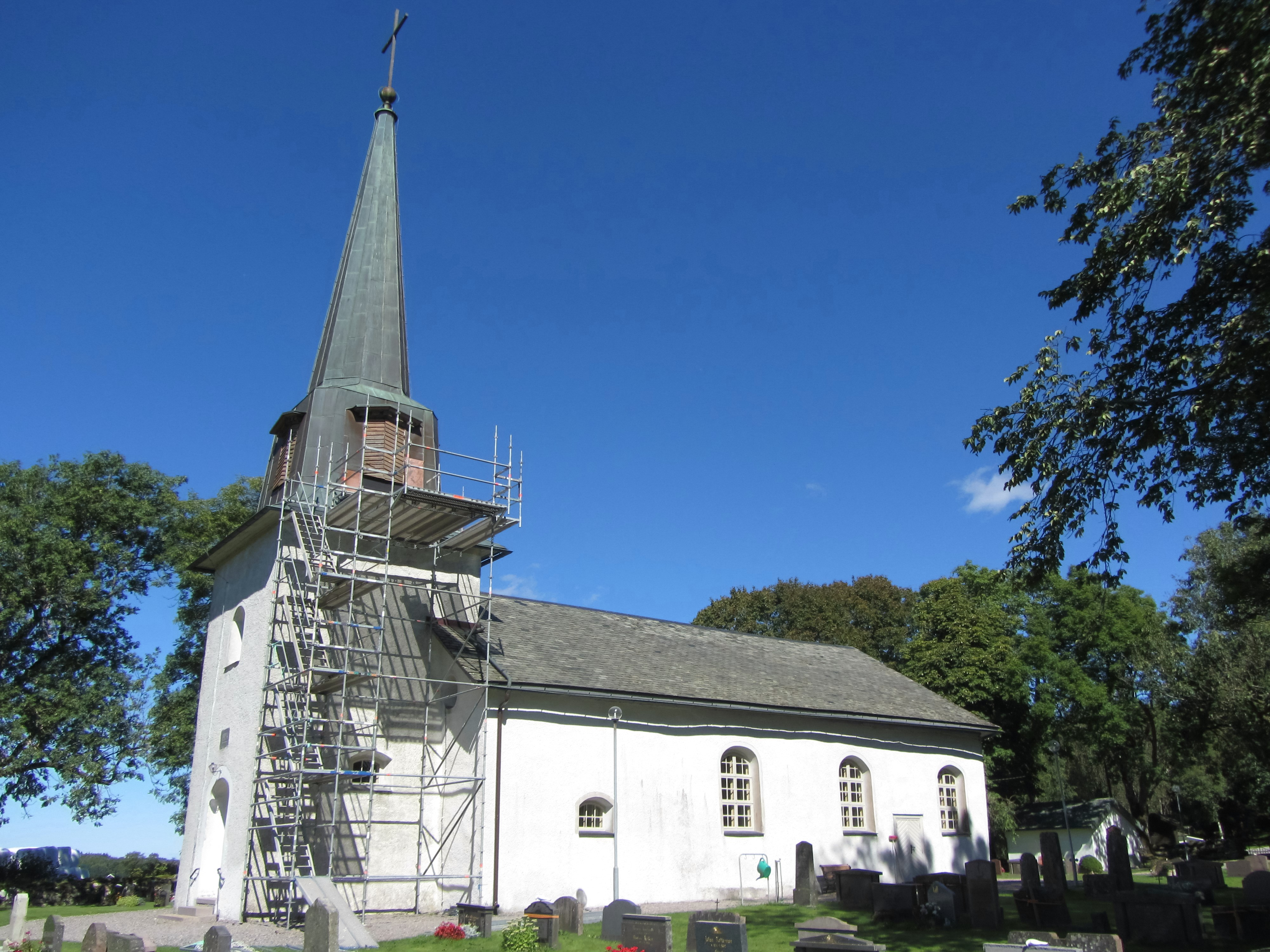 Järbo kyrka och kyrkogård i Dalsland.